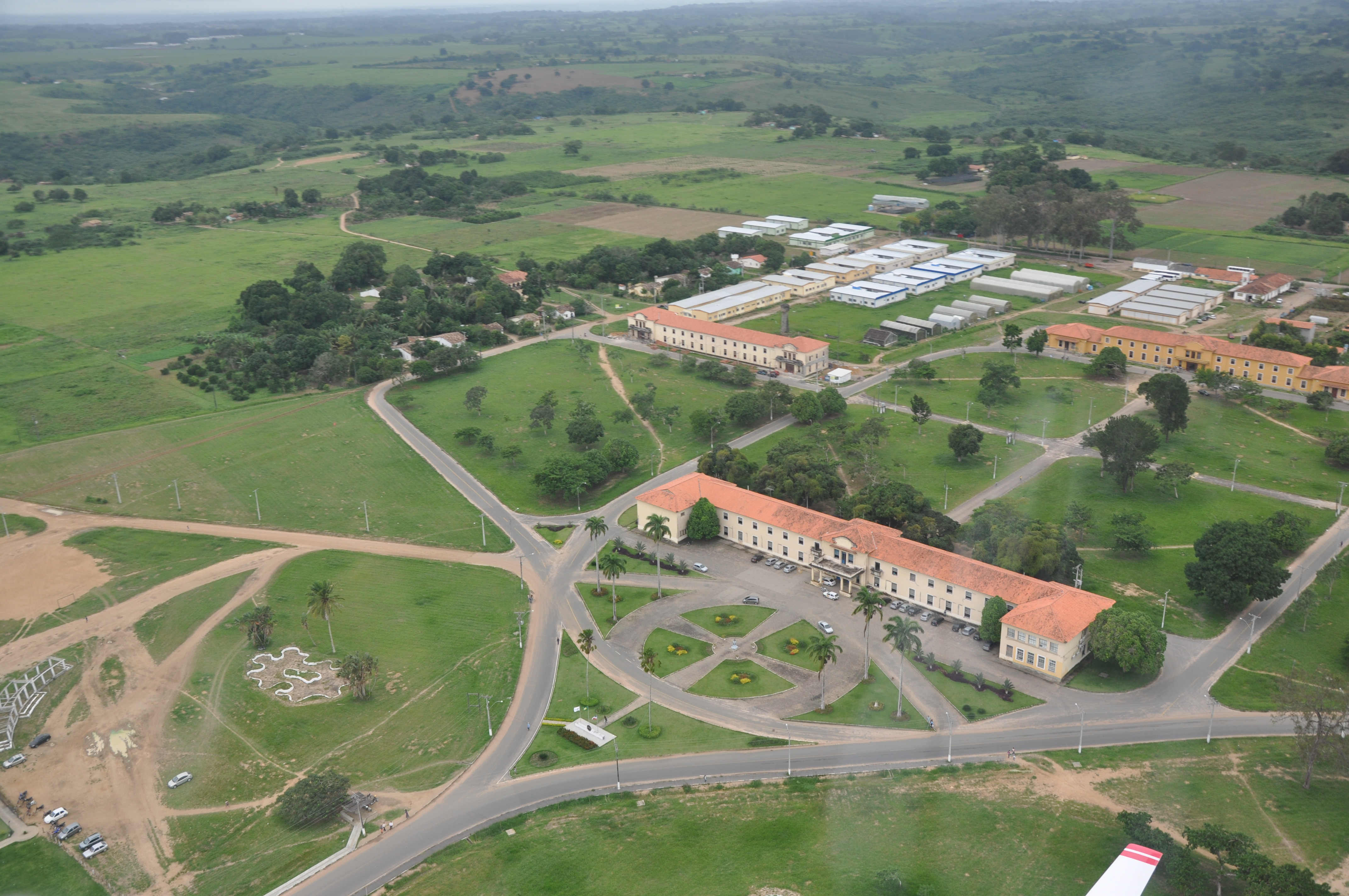 Vista aérea do Campus da UFRB - Cruz das Almas